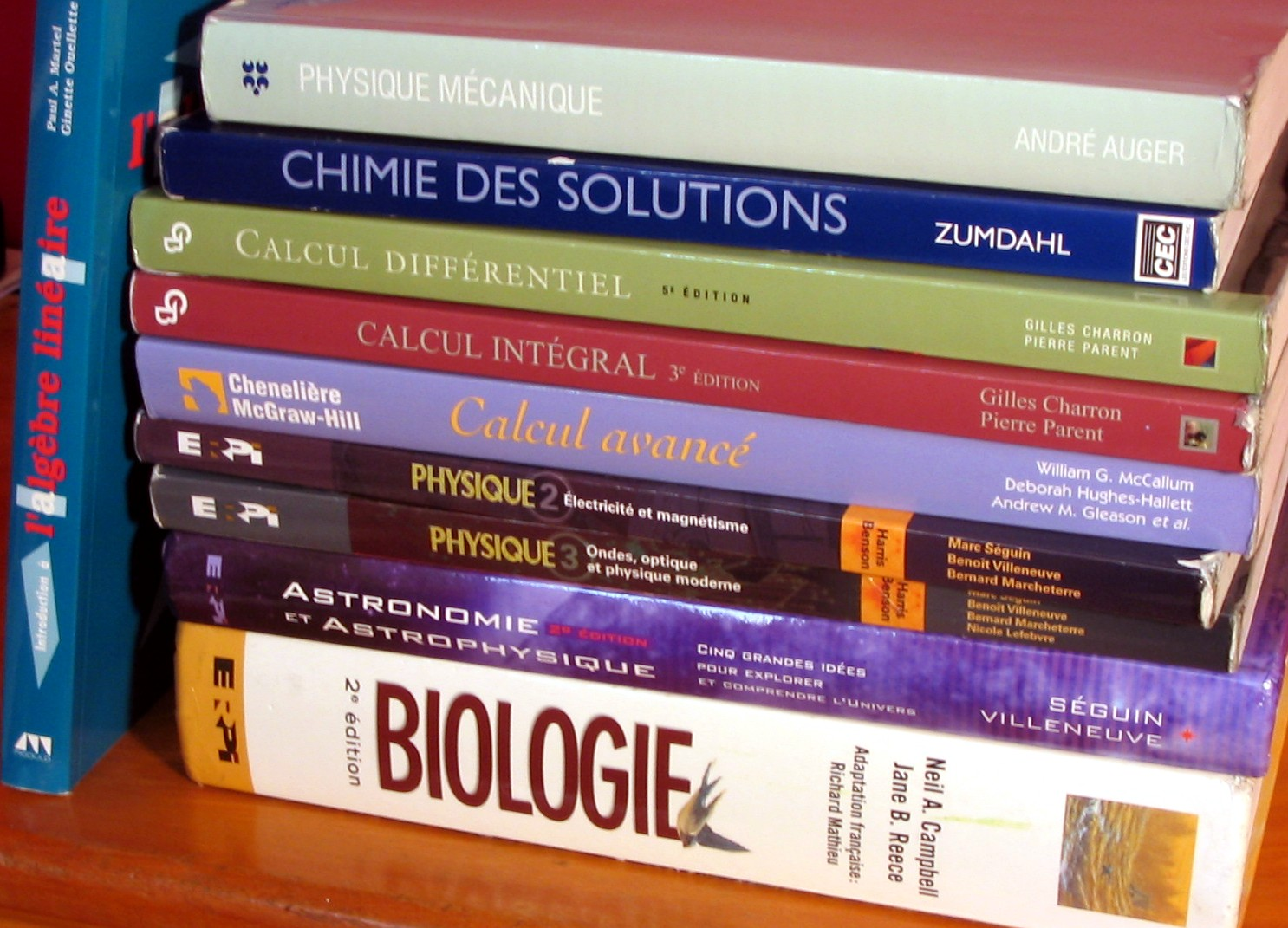 Quelques livres typiquement utilisés pour les études collégiales (circa. 2005) en sciences naturelles, soit quatre manuels de physique, un manuel de chimie, quatre manuels de mathématiques et un manuel de Biologie. Auteur : Denis Gagnon Date de prise de photo : 7 juin 2006